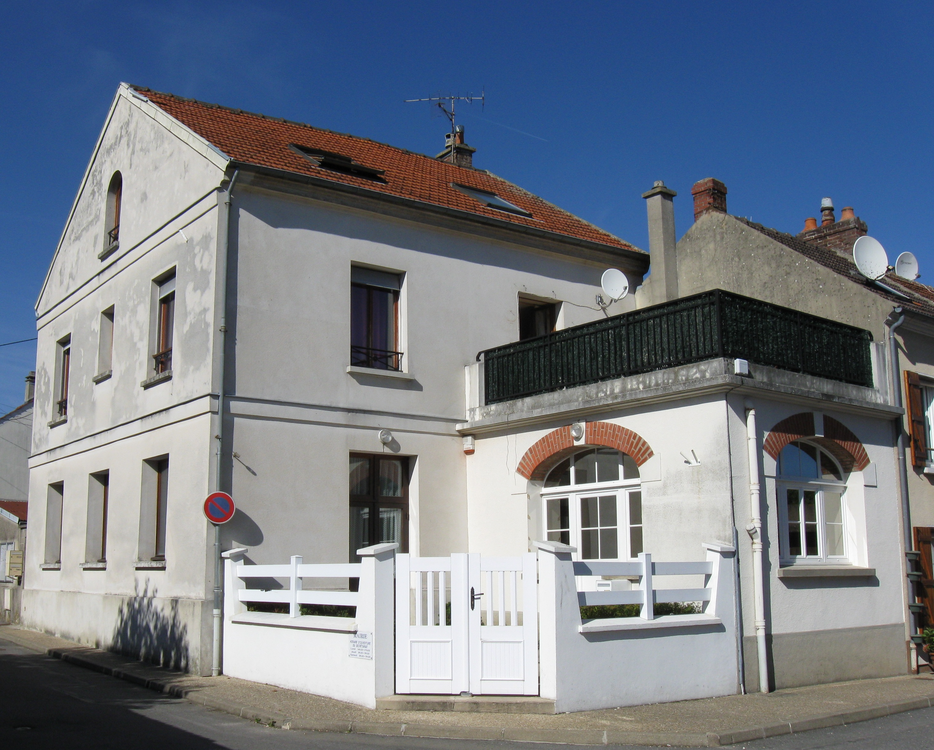 Mairie de Méry-sur-Marne (département de la Seine et Marne, région Île-de-France).